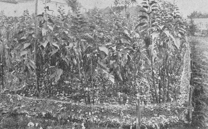 Park waar uit de natuur geraapte slakken bewaard worden